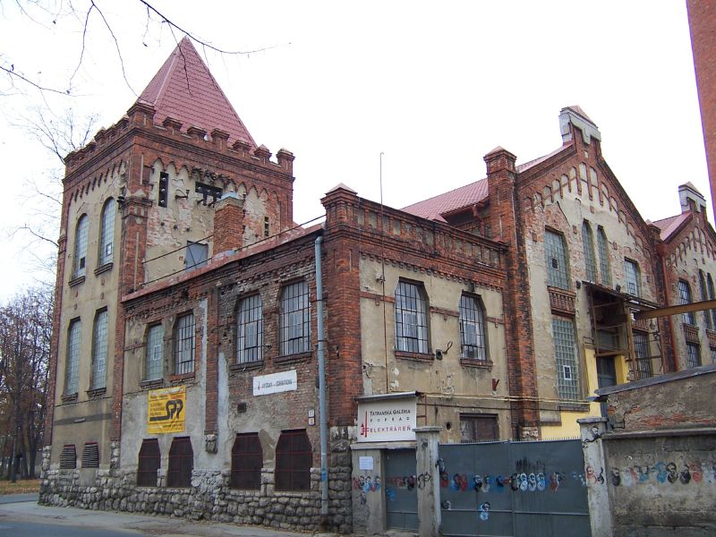 Tatranská galéria Poprad